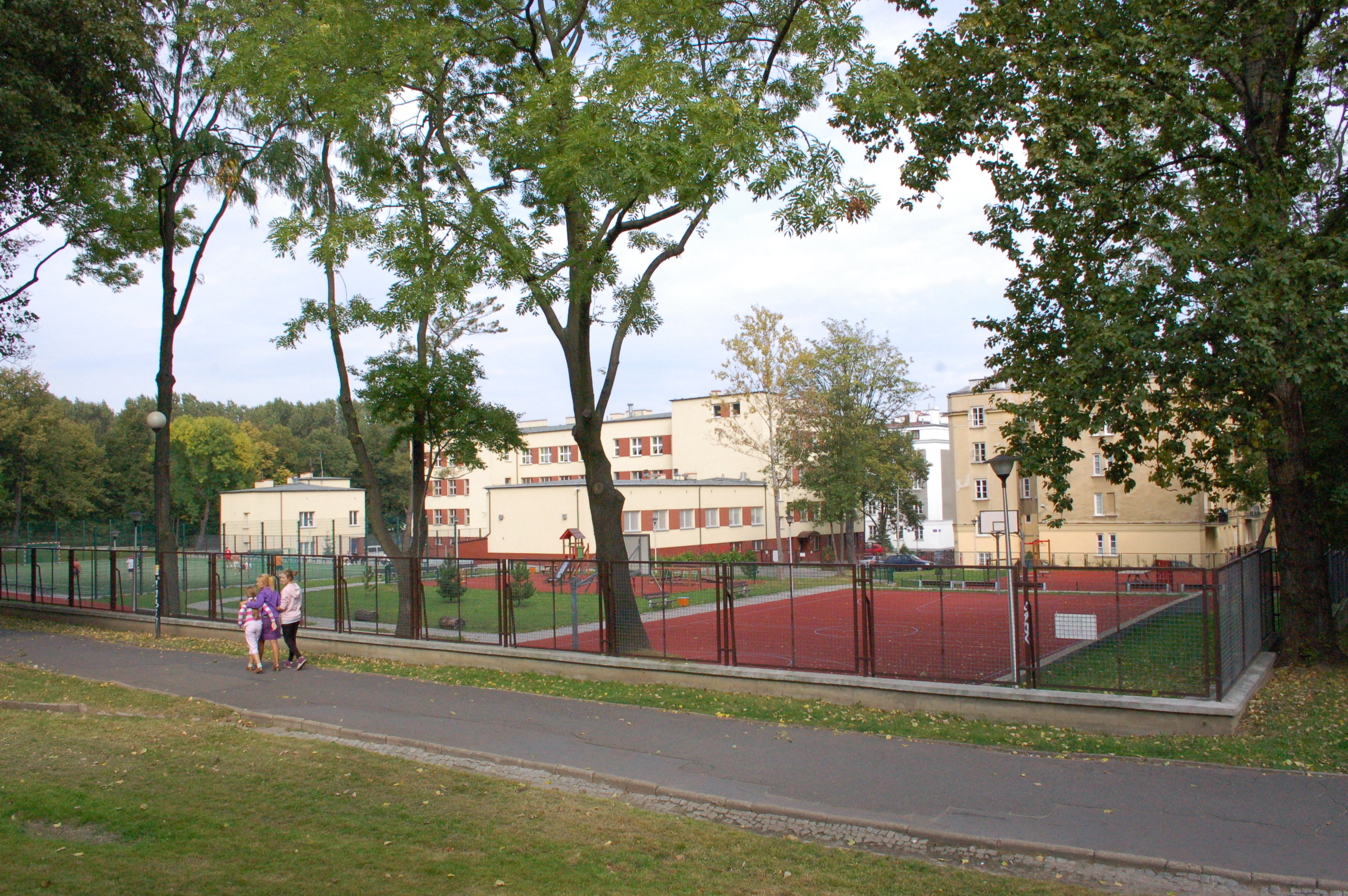 Park Morskie Oko in Warschau, Szkoła Podstawowa Nr 98, Ulica Pogodna, Ulica Grottgera